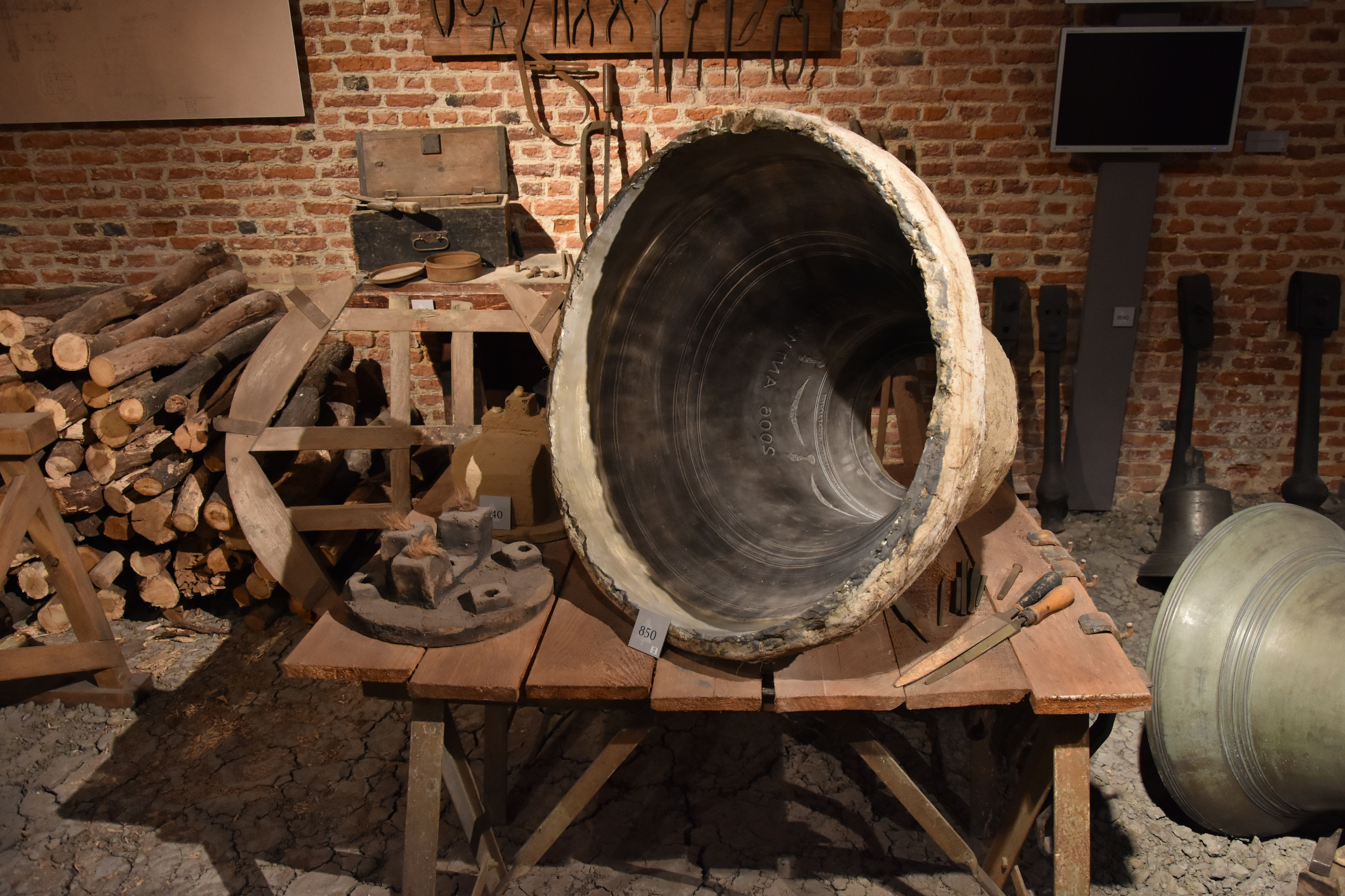 Klokkengieterij Vleeshuis Antwerpen 27-12-2018